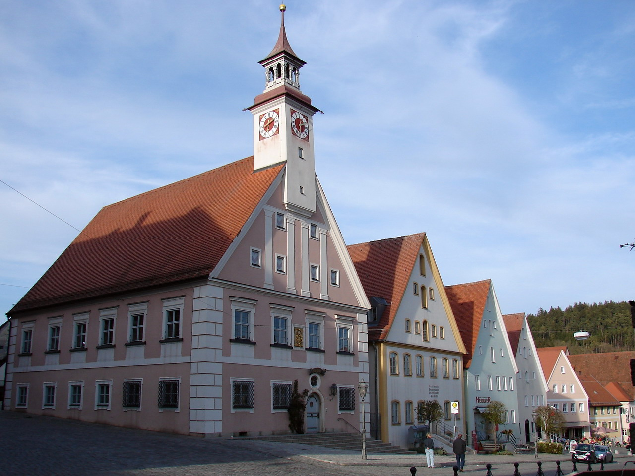 Rathaus, zweigeschossiger, giebelseitiger Satteldachbau mit Eckrustika und Dachreiter mit Helm und Laterne, barock, wohl von Jakob Engel, bez. 1699, Umbau von Fritz Mayer, 1935-37.